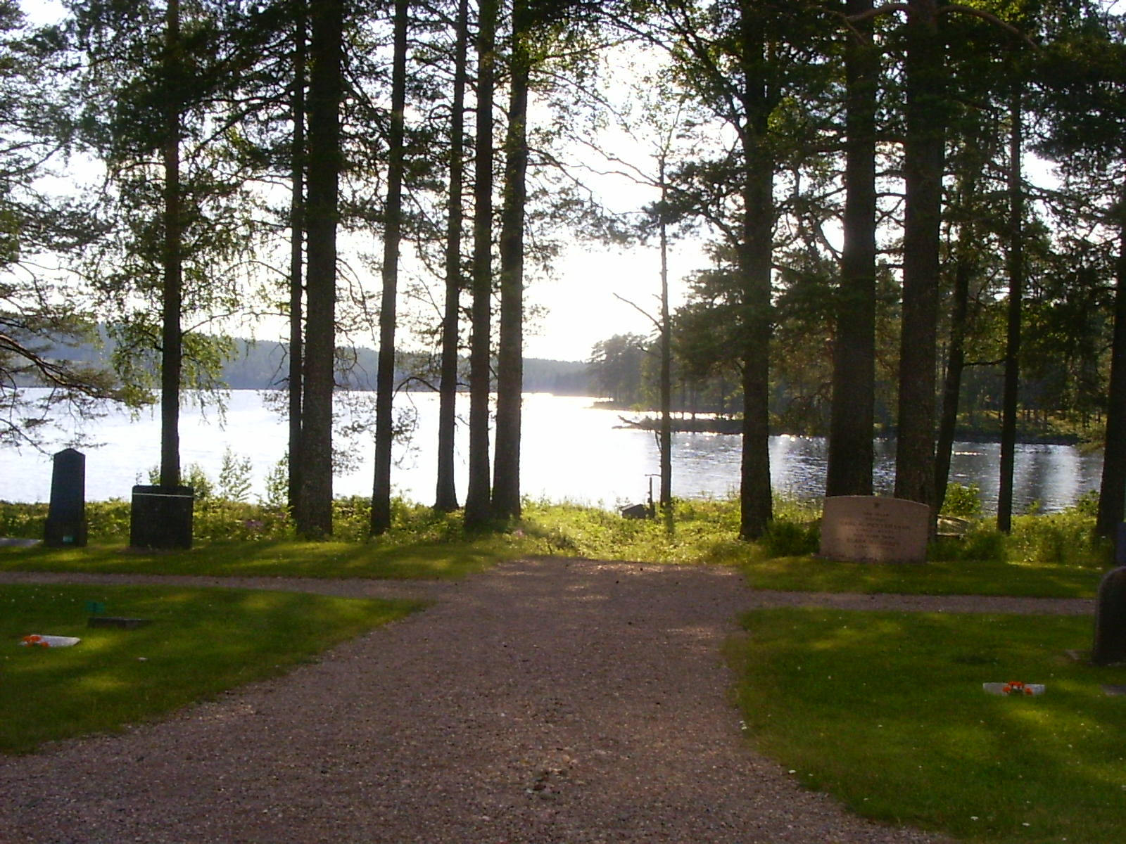 Het kerkhof van Tyngsjö, uitzicht op het meer Tyngsjön